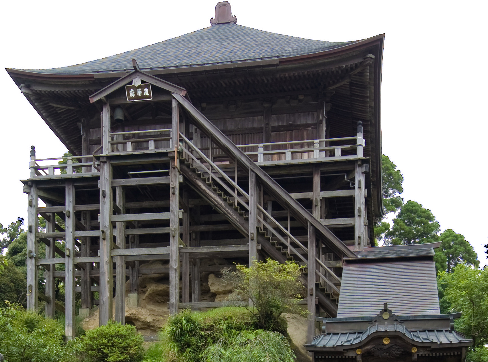 Kasamori-ji, at Chōnan, Chiba, Jpan.